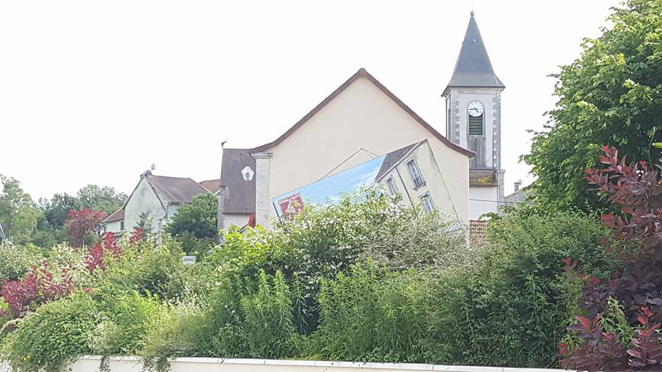 MAIRIE et église de FONCEGRIVE